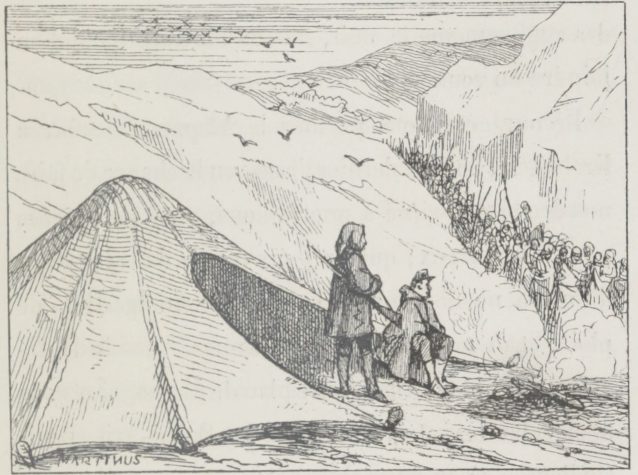 Chassaing et Bombonnel dans les Aures